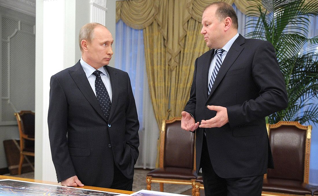 Рабочая встреча Владимира Путина губернатором Калининградской области Николаем Цукановым